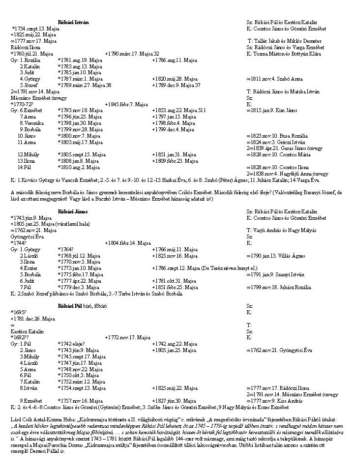 A kép a Wikipédia "Családfakutatás" szócikkéhez készített illusztráció. Részletet tartalmaz a megjelenés előtt álló "Kiskunmajsa családjai 1739-1855" c könyvből, s példaként szolgál az írott családfakutatási publikáció cédulázásos anyaggyűjtésére.